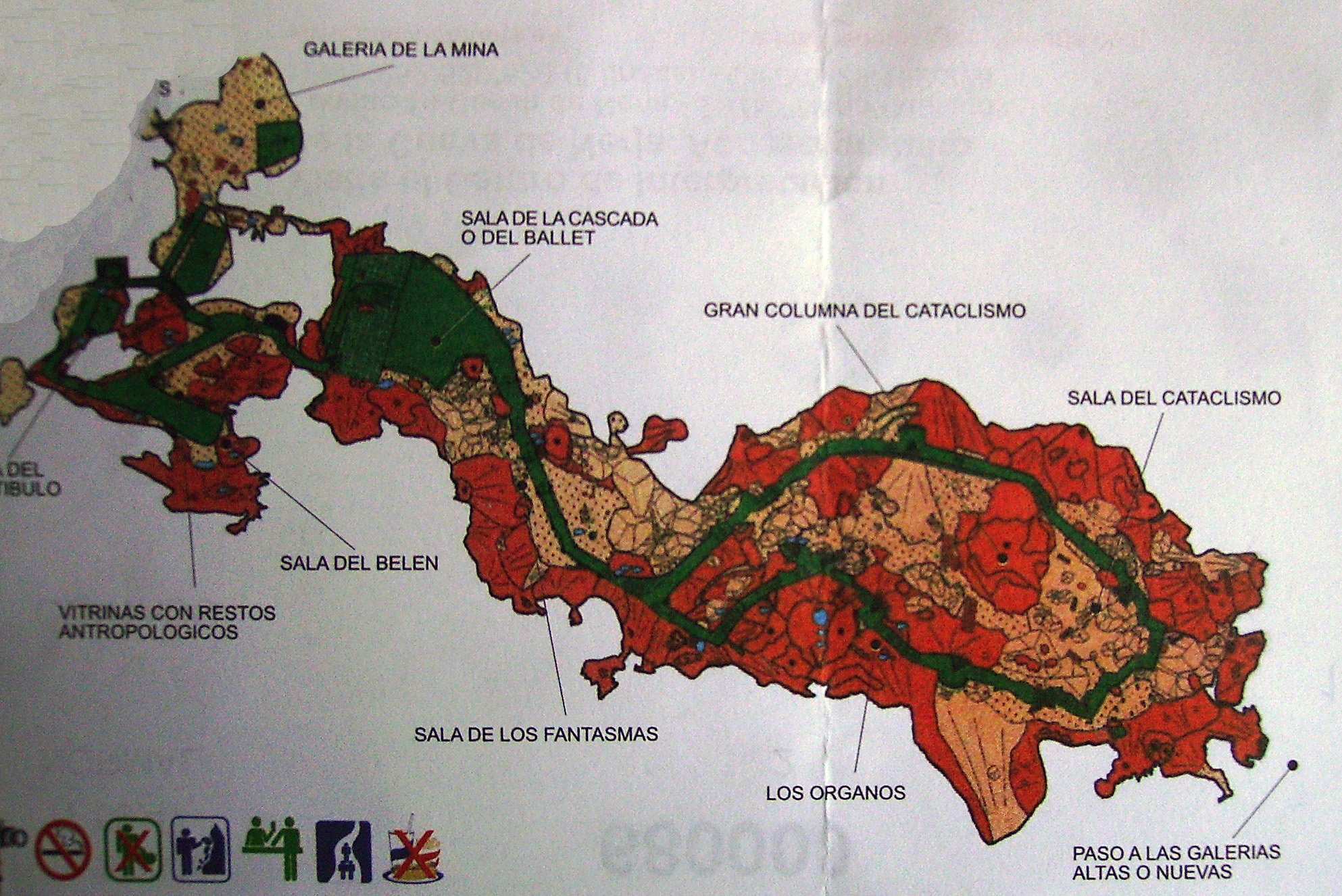 Cueva de Nerja